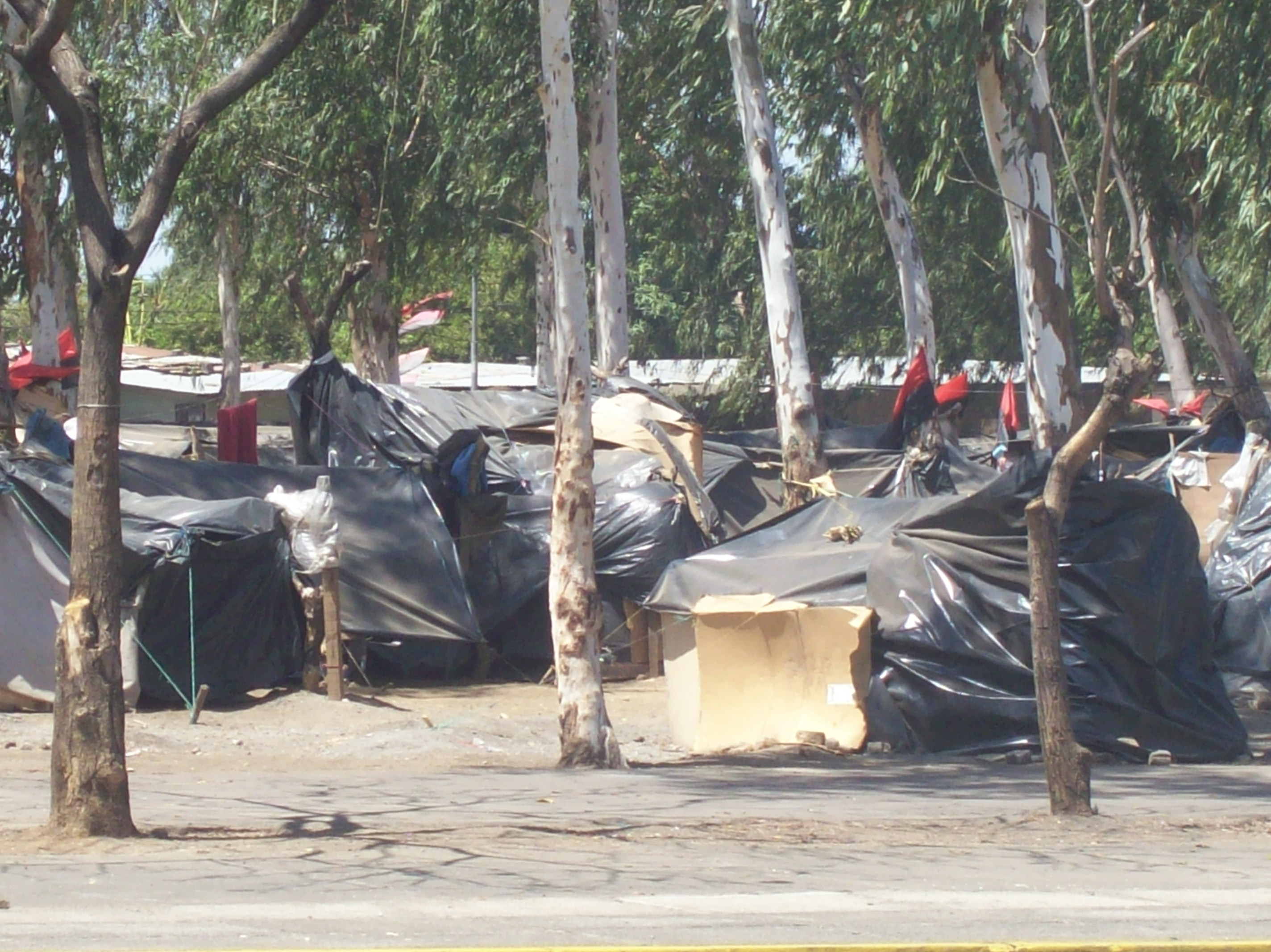 Areas marginales en Nicaragua